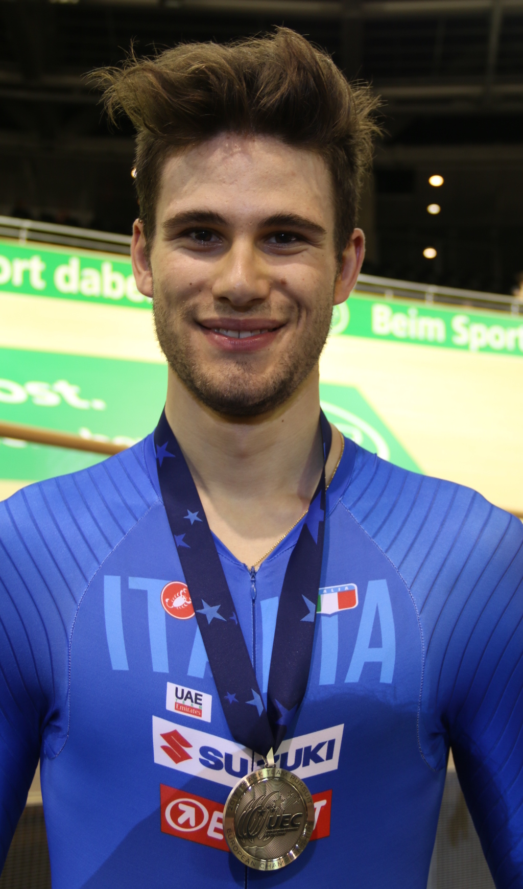 Filippo Ganna, italienischer Radsportler - Gold in der Einerverfolgung